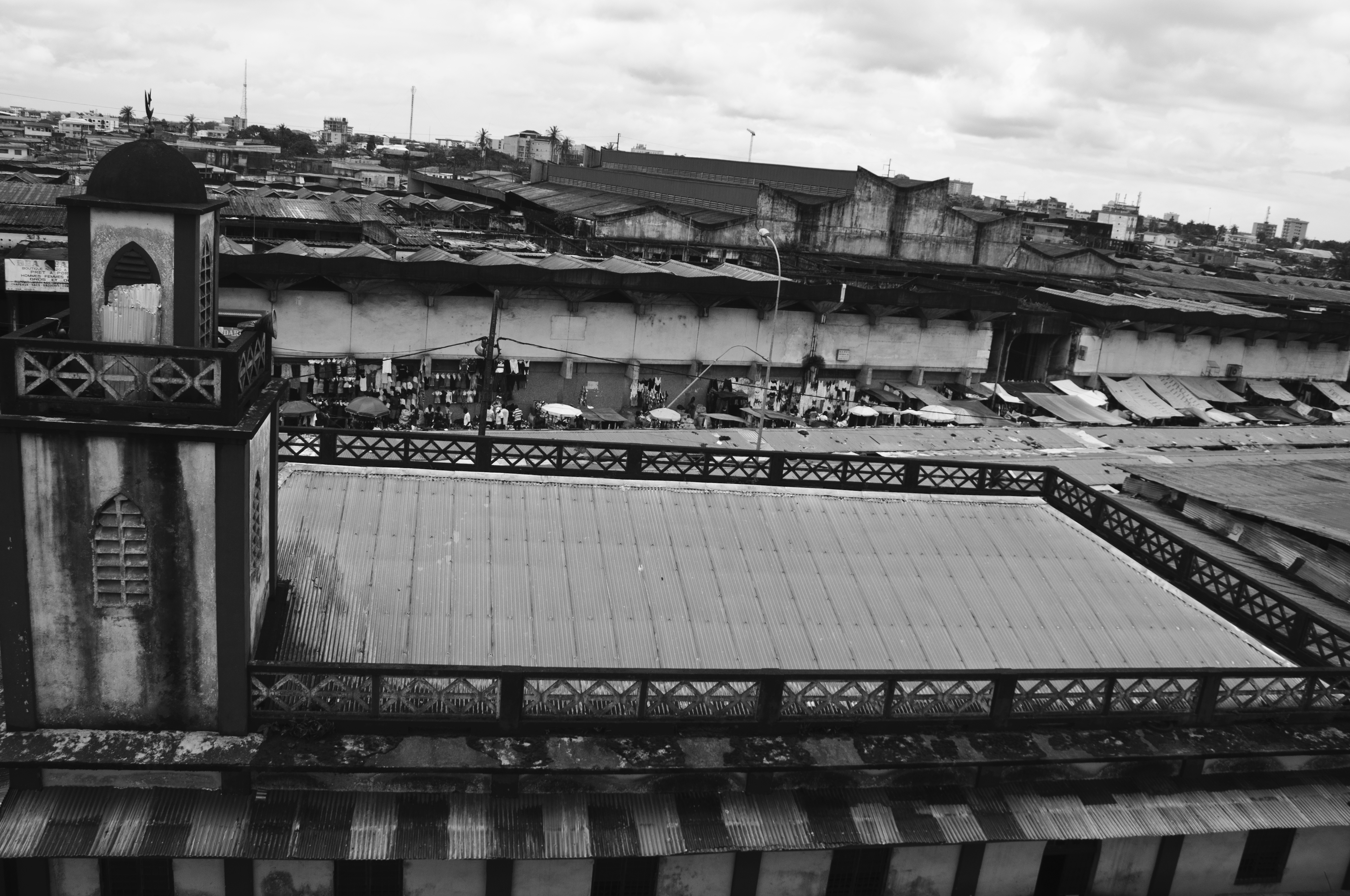 Mosqué central de new-bell( marché) central Douala